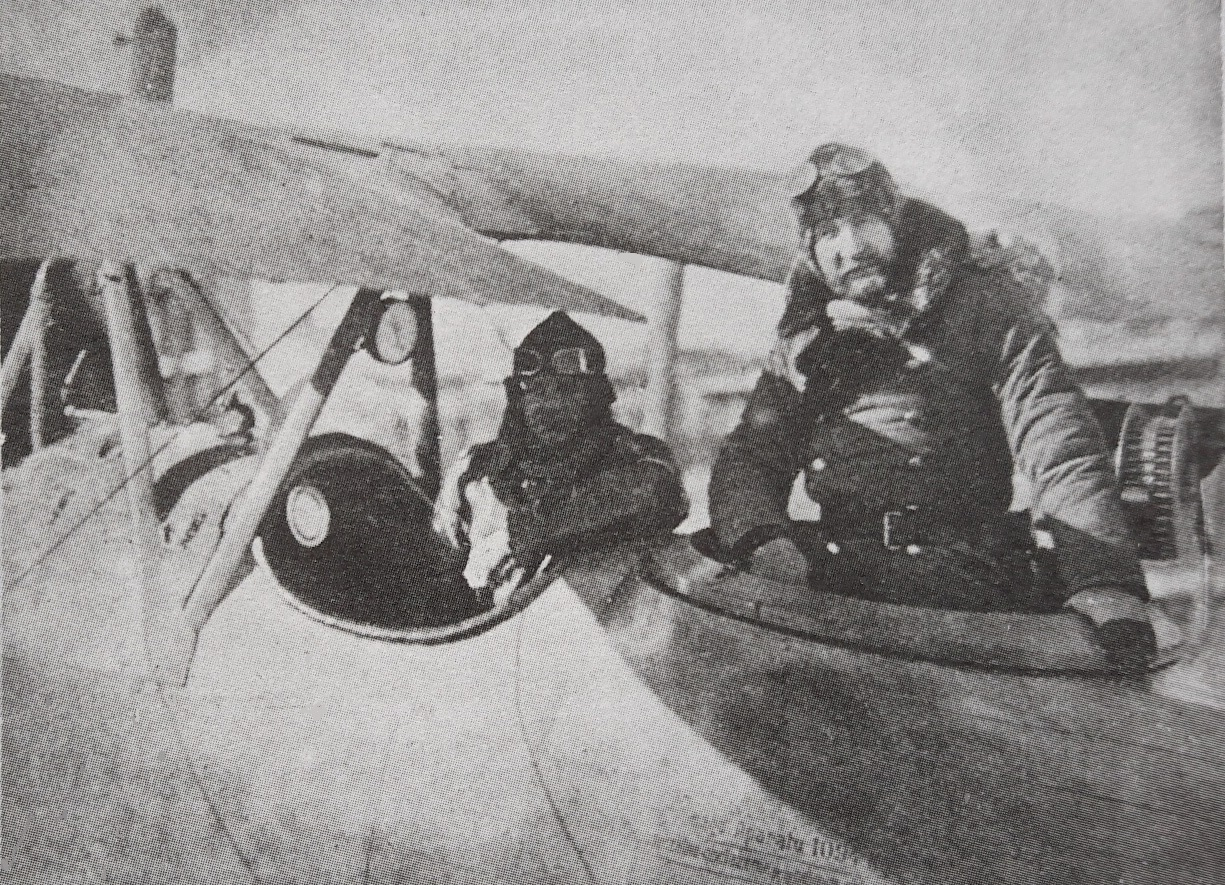 Gen. Tadeusz Rozwadowski, dowódca grupy "Wschód", po przylocie z Przemyśla do Lwowa w styczniu 1919 r. Pilot kpt. Camillo Perini.